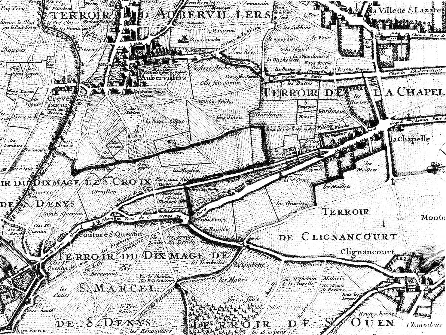 Le terroir de Saint-Denis-en-France gravé par Charles Inselin (1708).